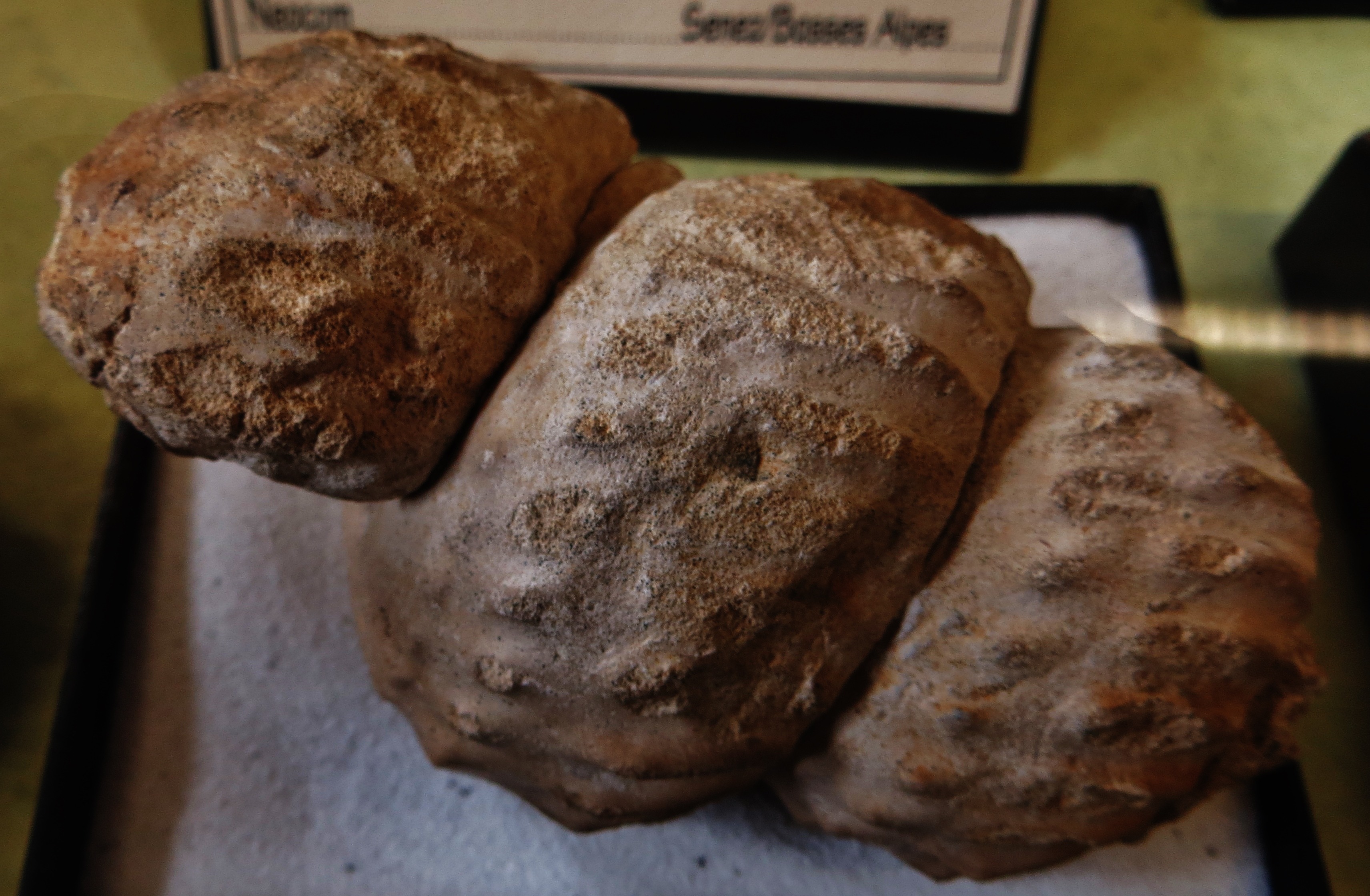 Fossil of Turrilites - Took the picture at Natural History Museum, Bonn University